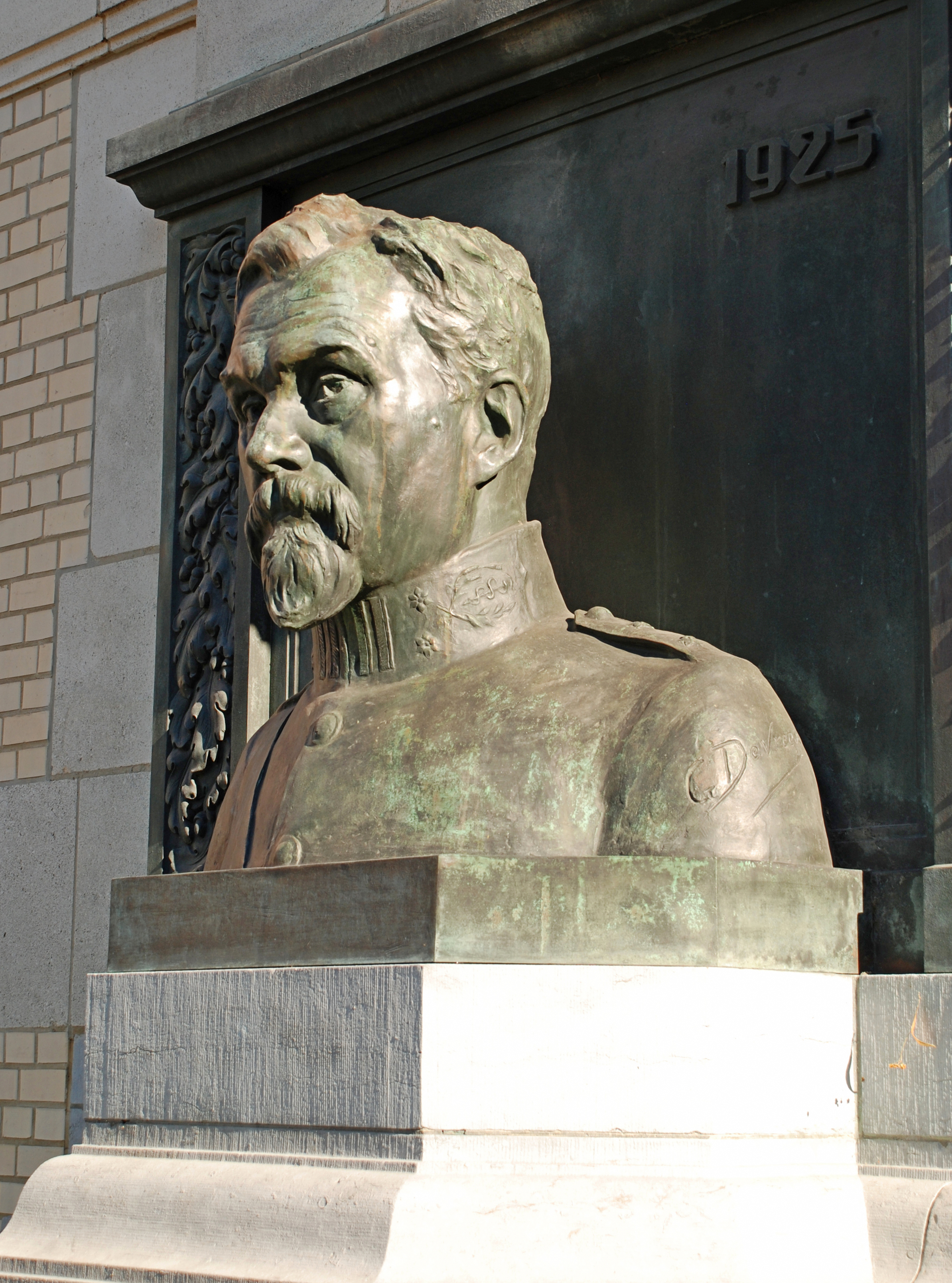 Belgique - Bruxelles - Institut médico-chirurgical de la Croix-Rouge (place Brugmann) - Monument à Antoine Depage (Godefroid Devreese, 1926)